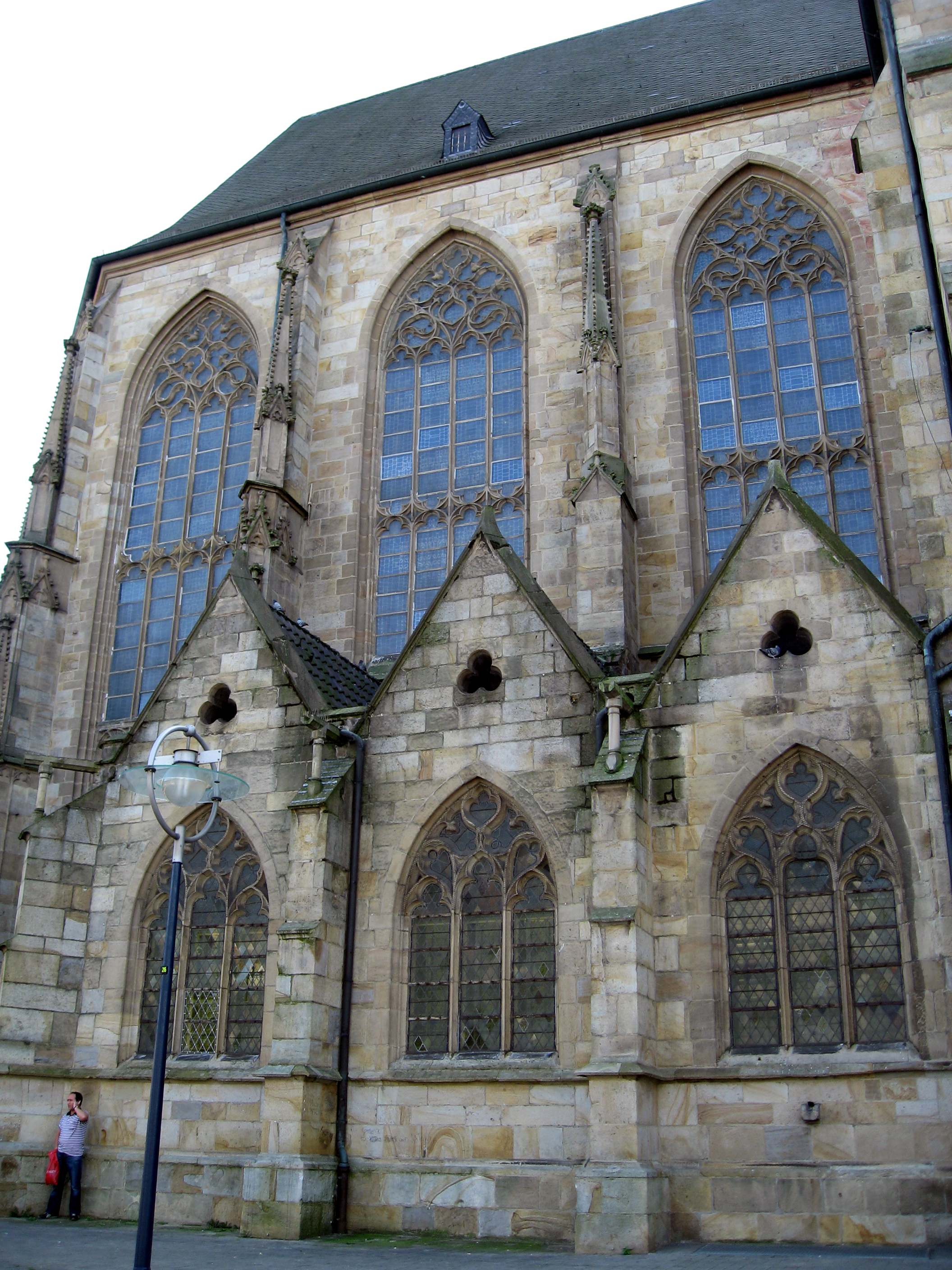 Dortmund, Reinoldikirche von Nordwesten